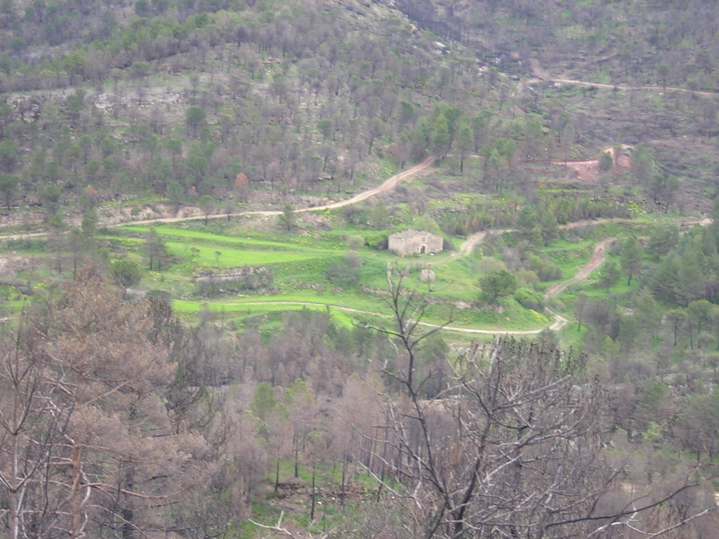 Espai on era la masia de l'Om (Monistrol de Calders, Moianès)